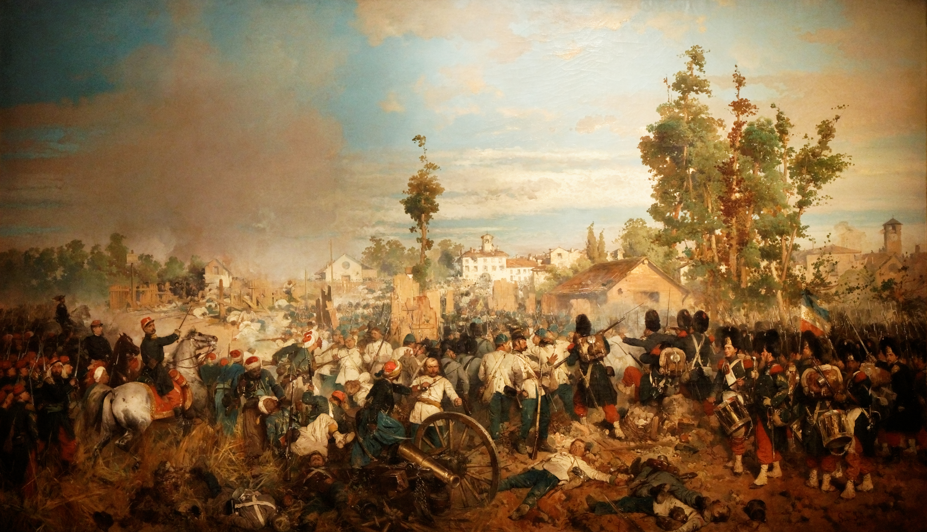 La bataille de Magenta par Gerolamo Induno.